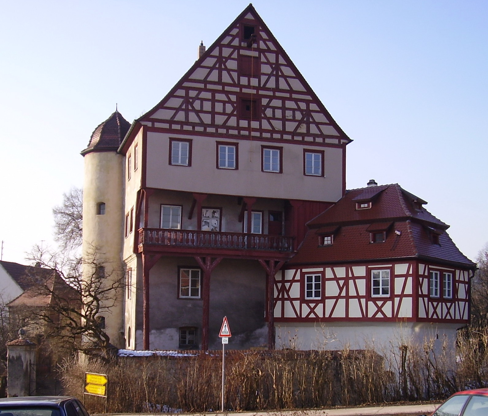 Leinzeller Schloss